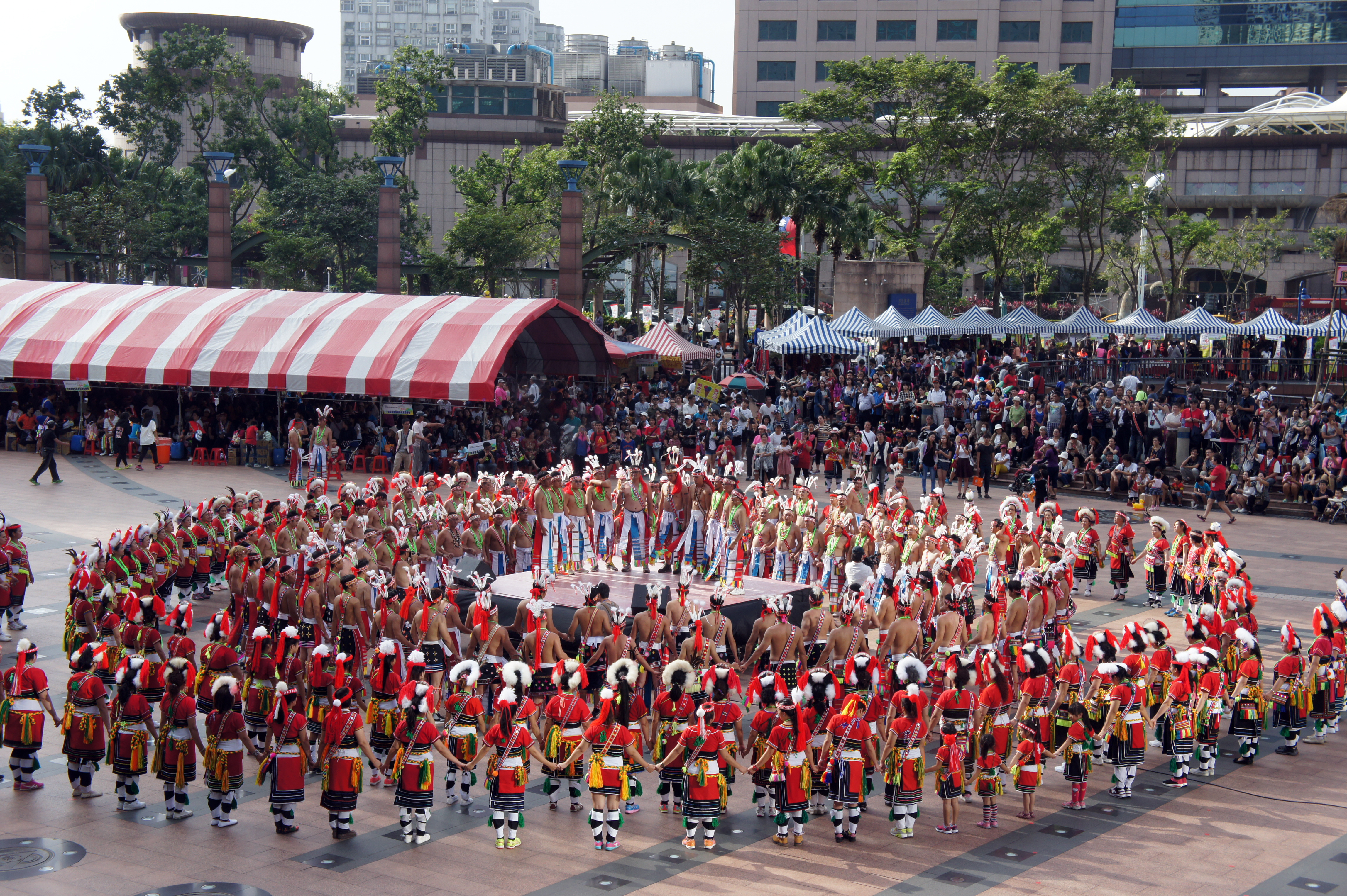 2015新北市聯合豐年祭 Malikuda